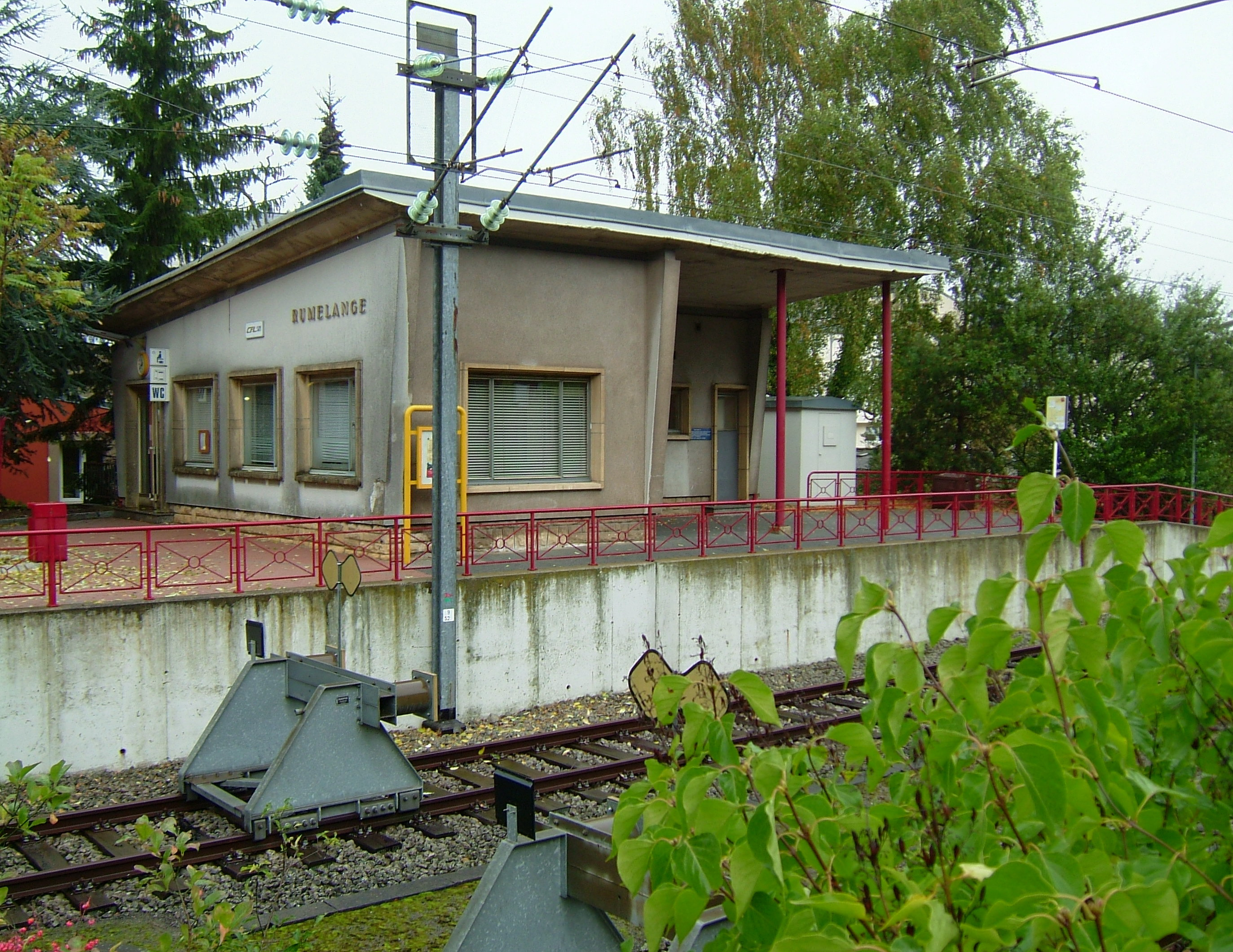 Gare Rëmeleng